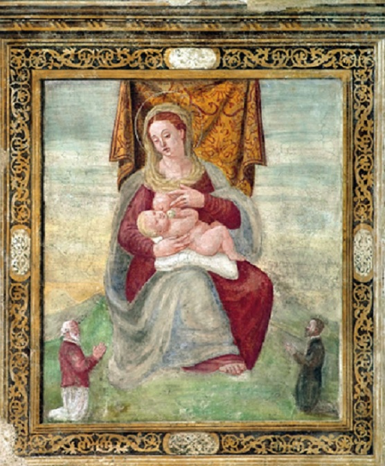 Madonna del latte, affresco, chiesa di S. Giovanni Battista, Settimo di Cinto Caomaggiore